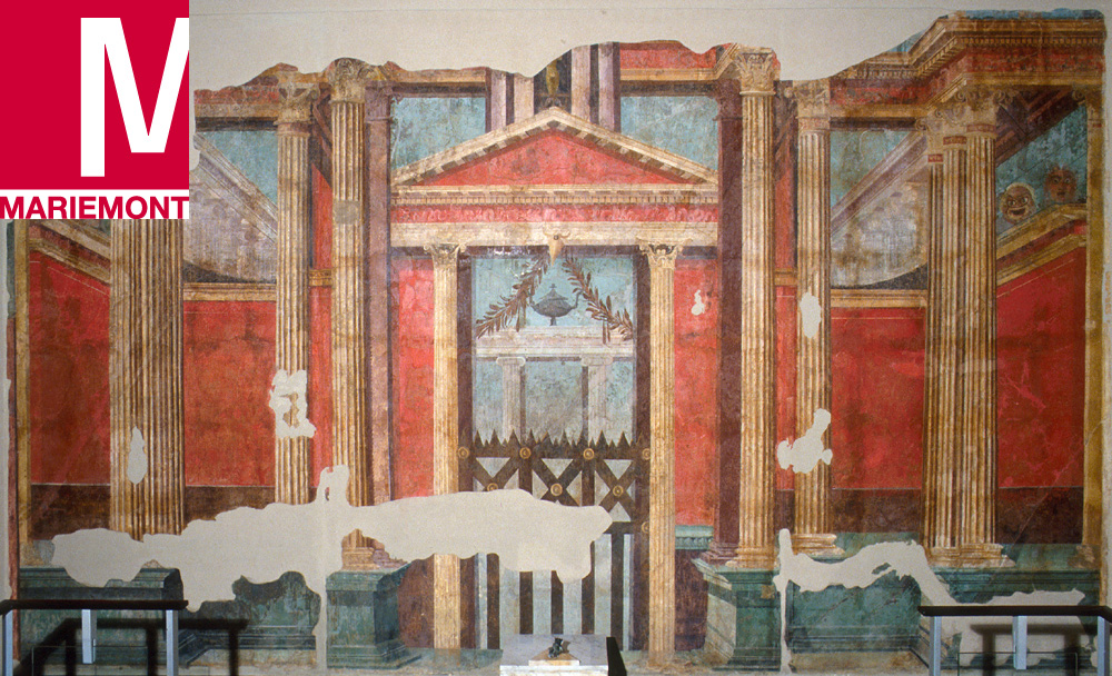 Fresque de Boscoréale conservée au Musée royal de Mariemont (Belgique)